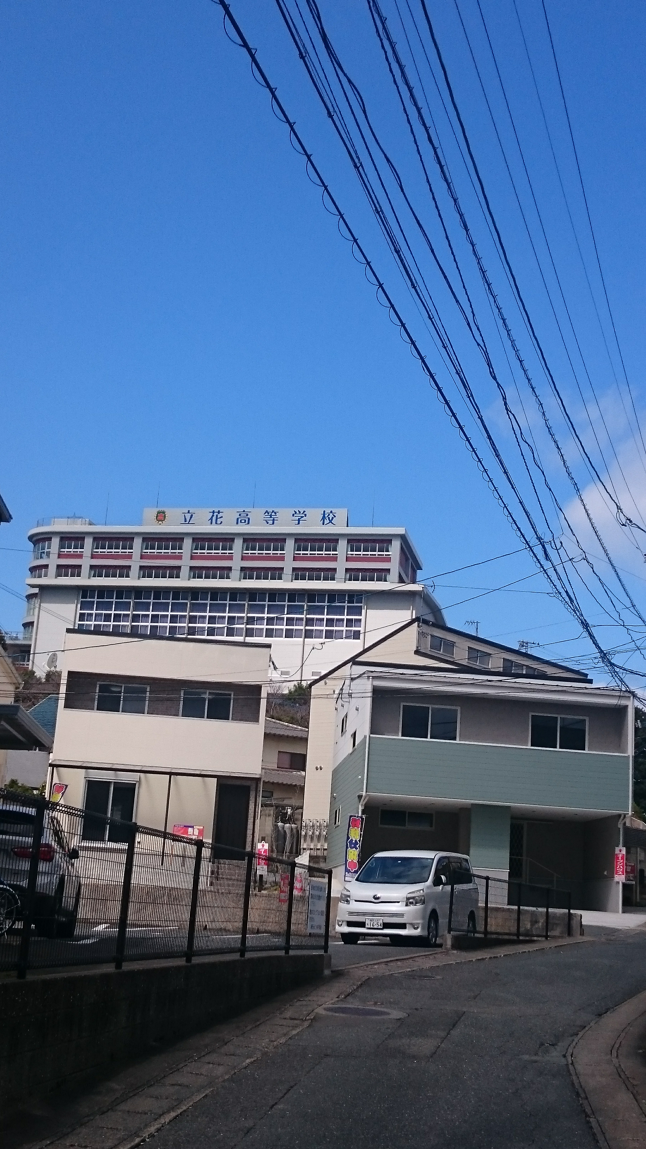 立花高等学校の新校舎です。